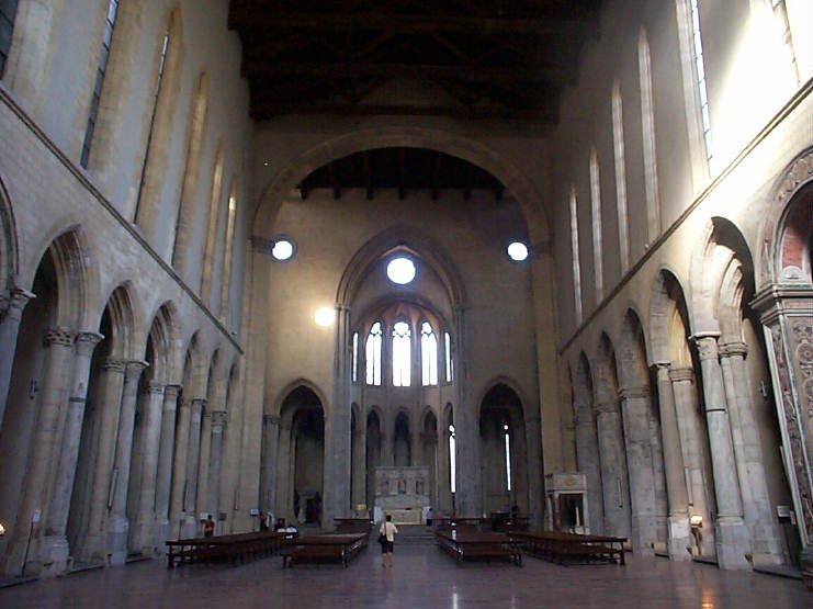 Napoli, Chiesa di San Lorenzo Maggiore - interno.